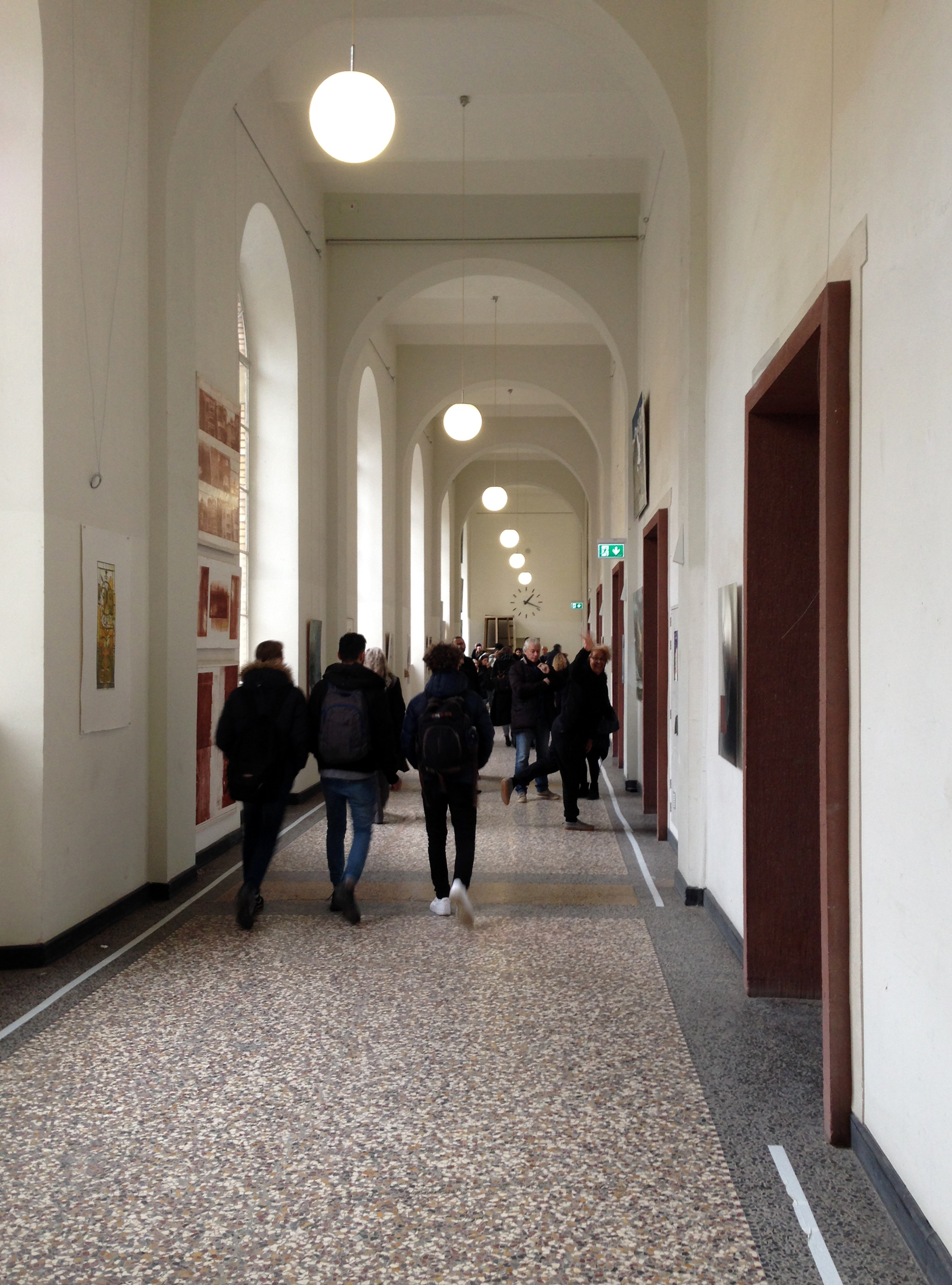 Kunstakademie Düsseldorf, Gang Parterre